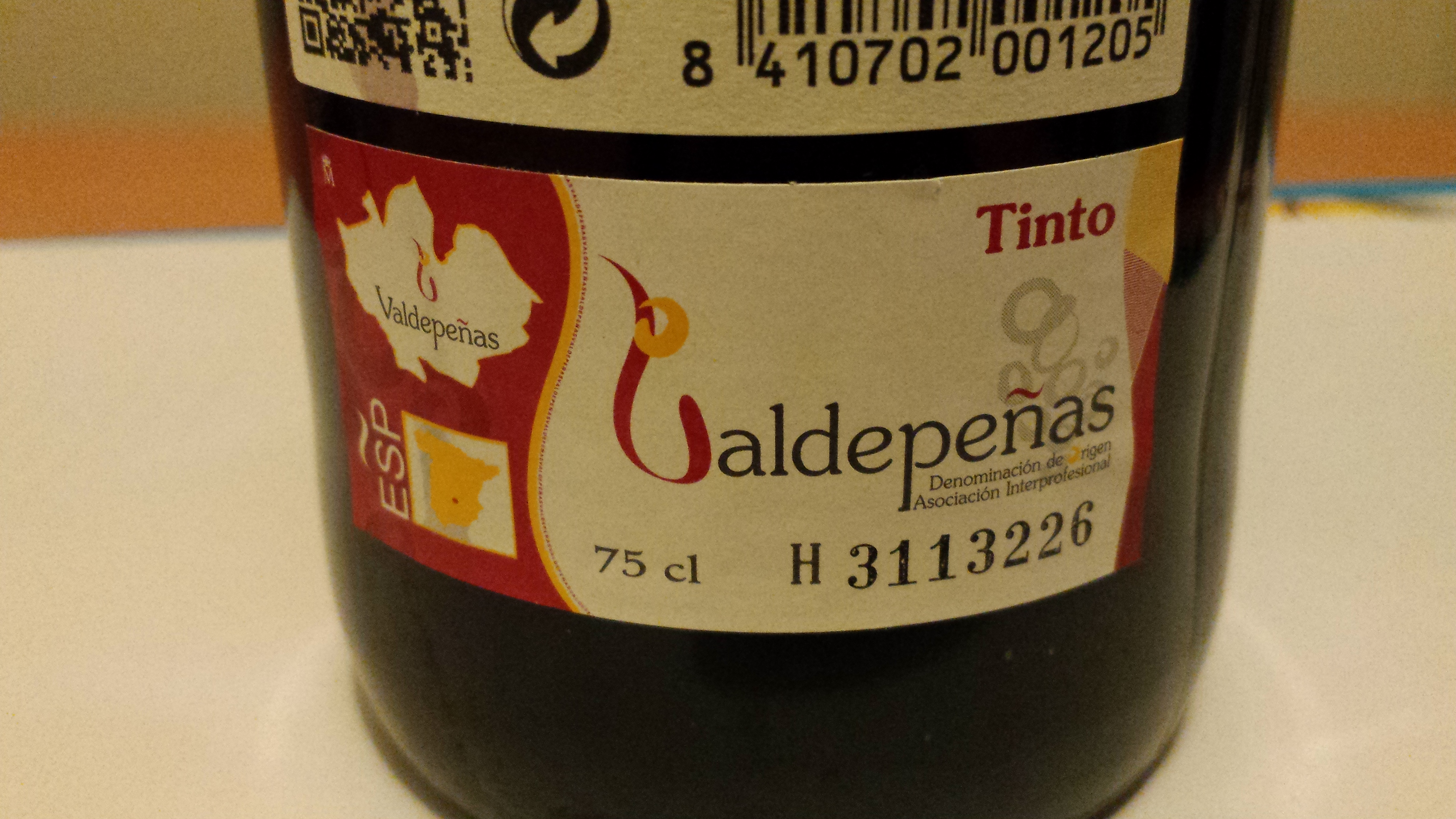 Etiqueta de la DO , Valdepeñas, Ciudad Real, España.